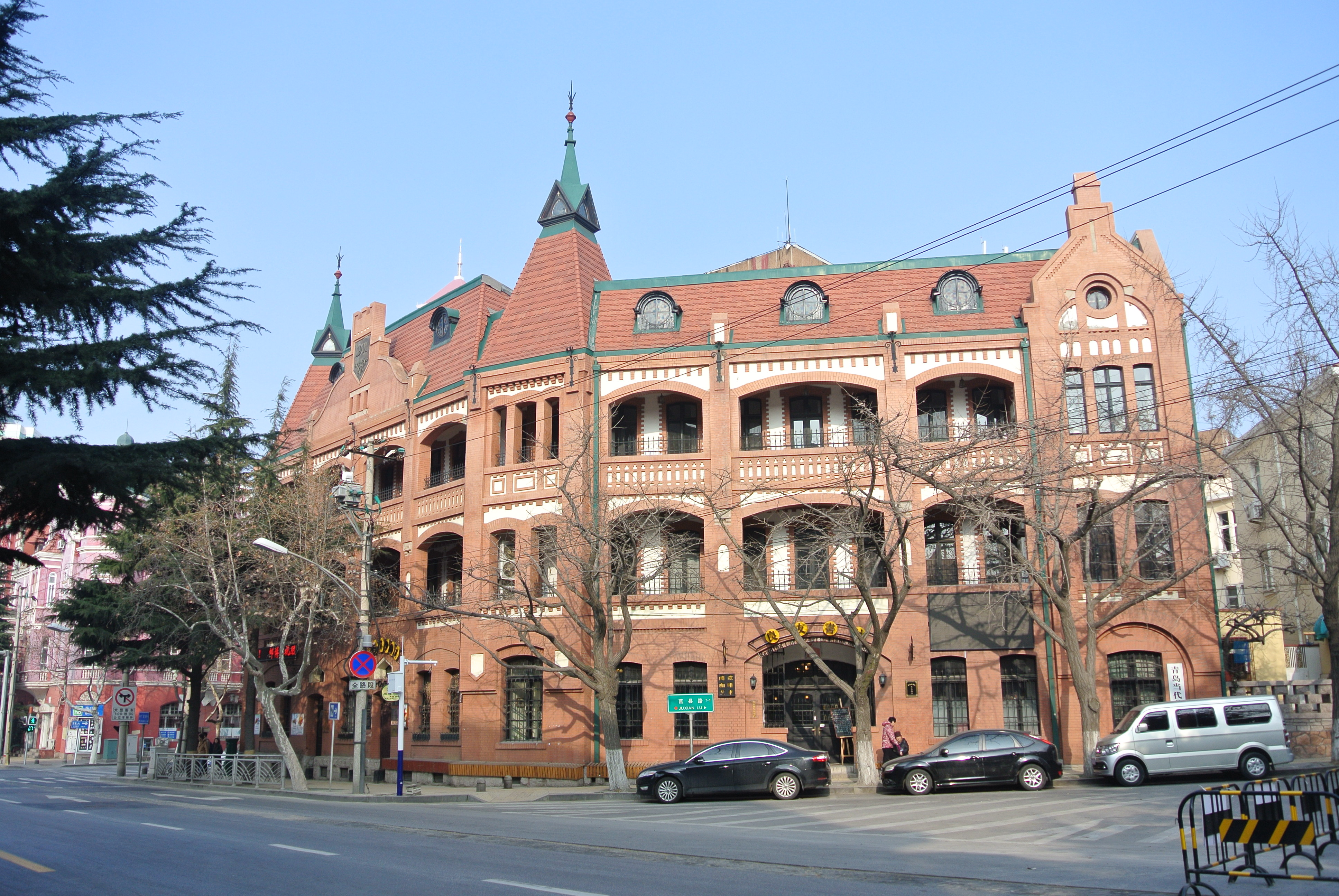 青岛邮电博物馆胶澳帝国邮局旧址